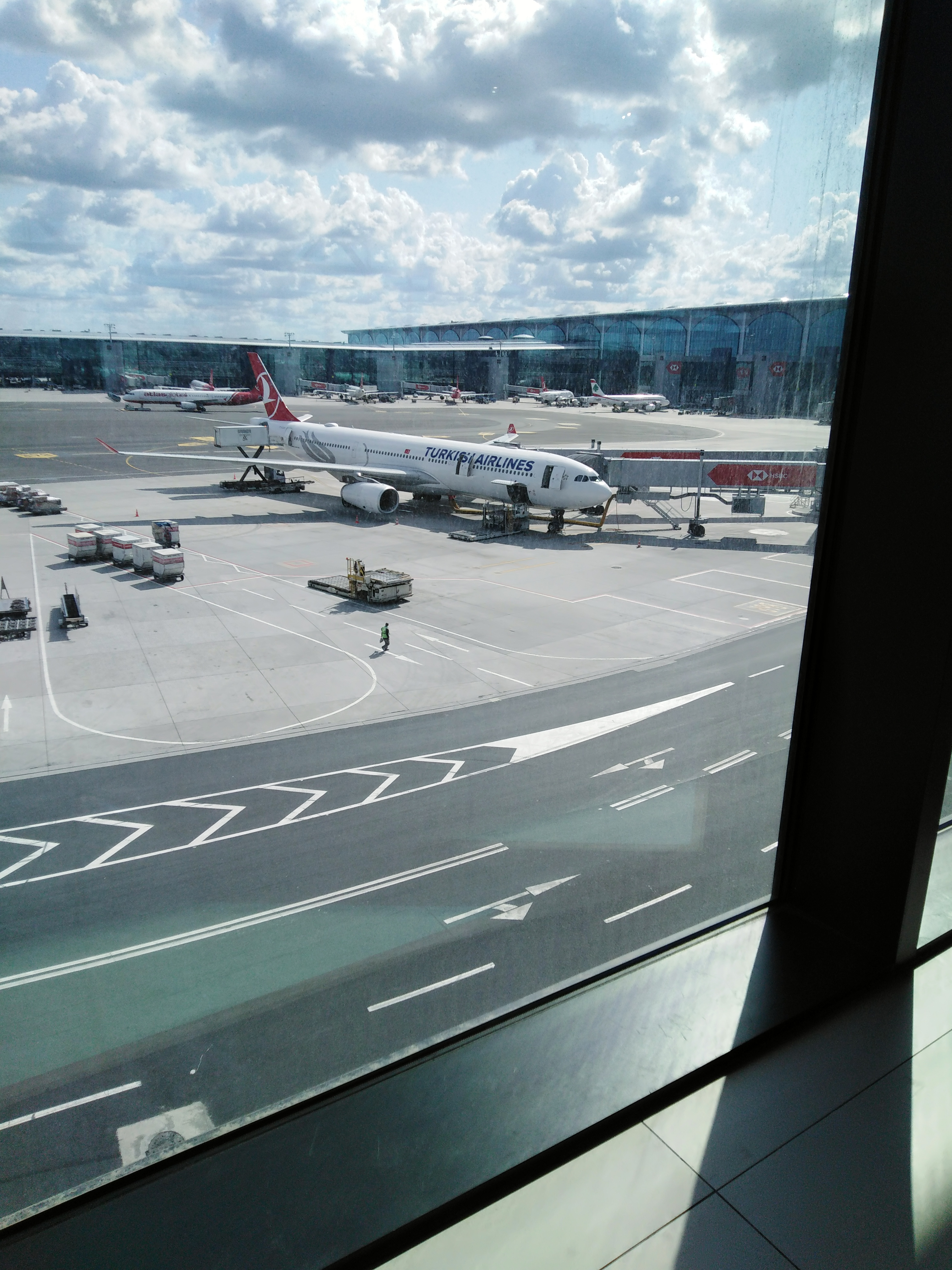 استنبول ہوائی اڈا رن وے